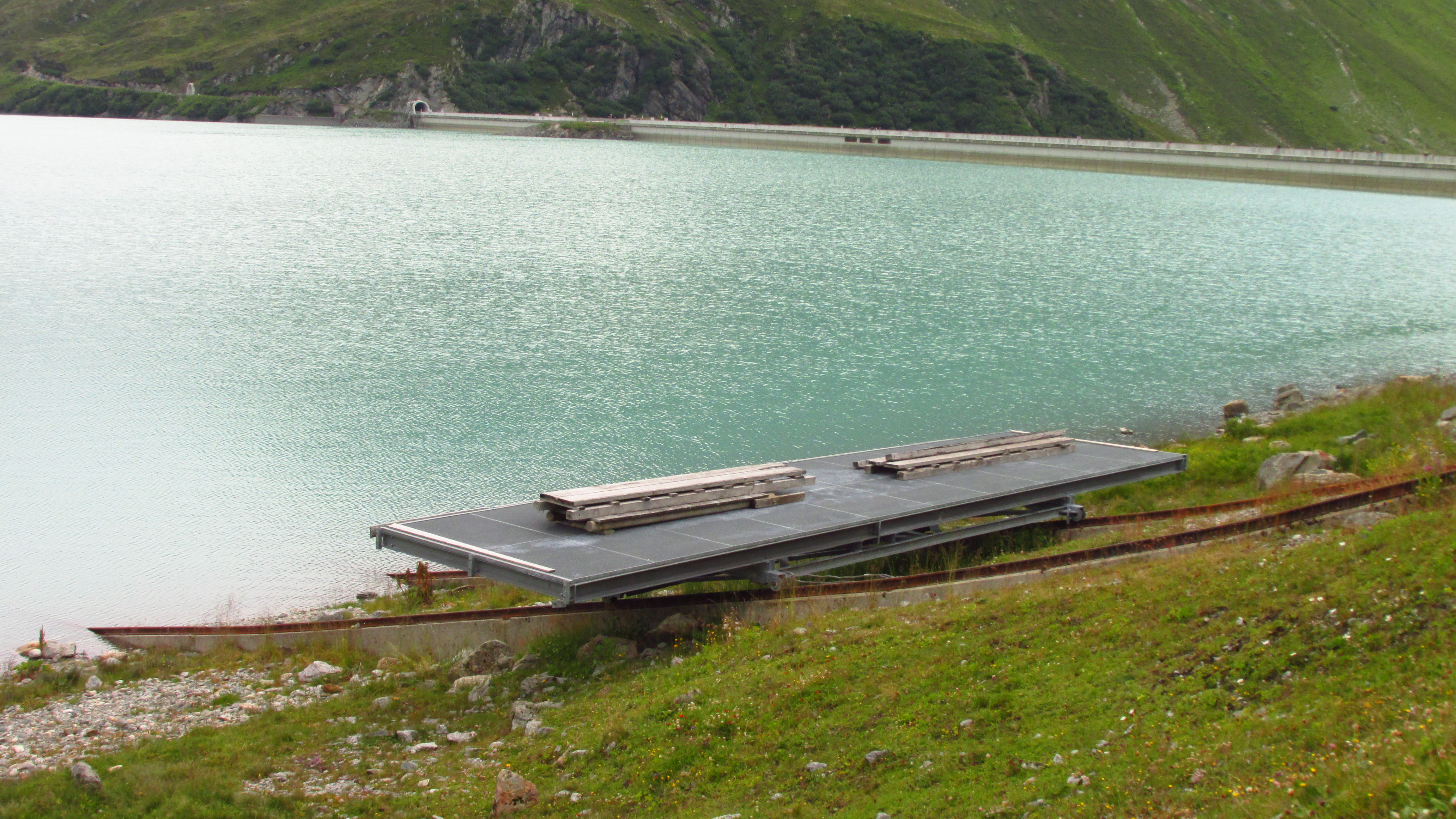 Slipanlage an der Bielerhöhe für das ehemalige Motorschiff "Silvretta"